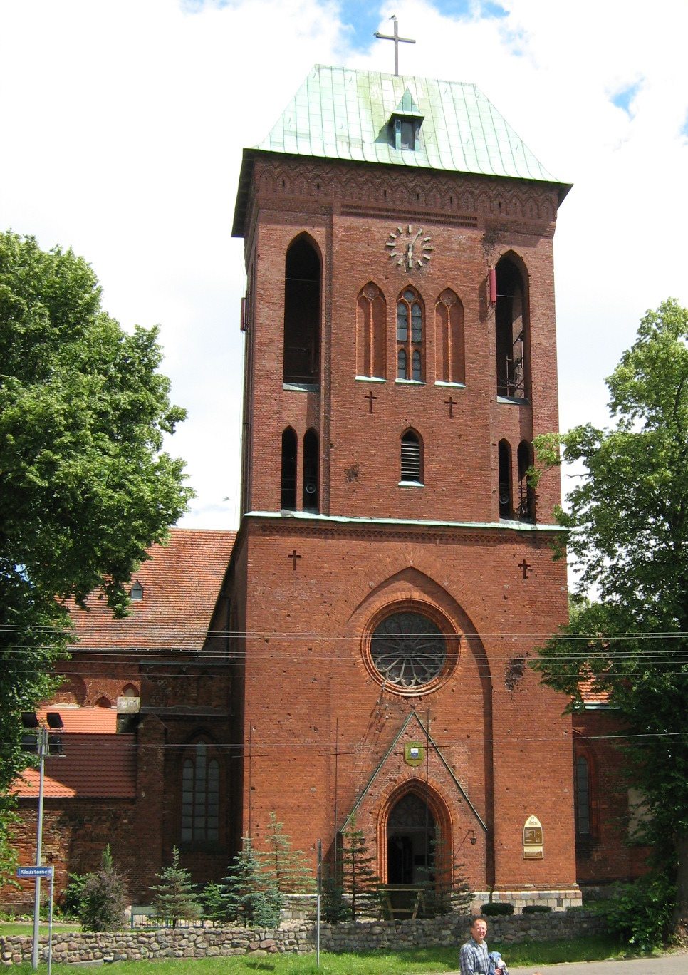 Catedral church in Kamień Pomorski, Poland